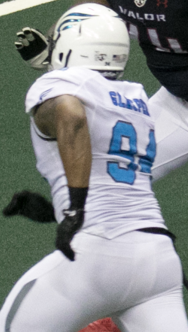 Valor 47 / Philadelphia Soul 48